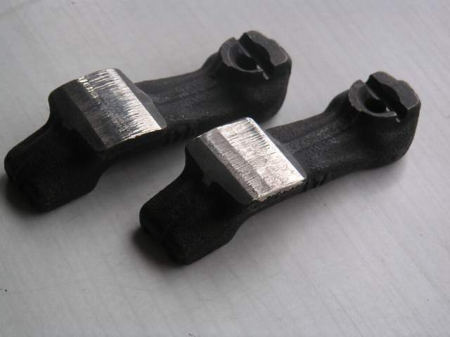 Poussoirs pour arbre à cames usés anormalement --Jean-Jacques MILAN 00:35, 14 Nov 2004 (UTC)